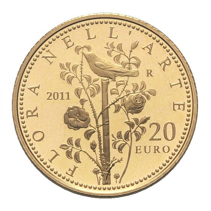 Rovescio della moneta in oro da 20 euro italiana della serie Fauna nell'arte (2011)